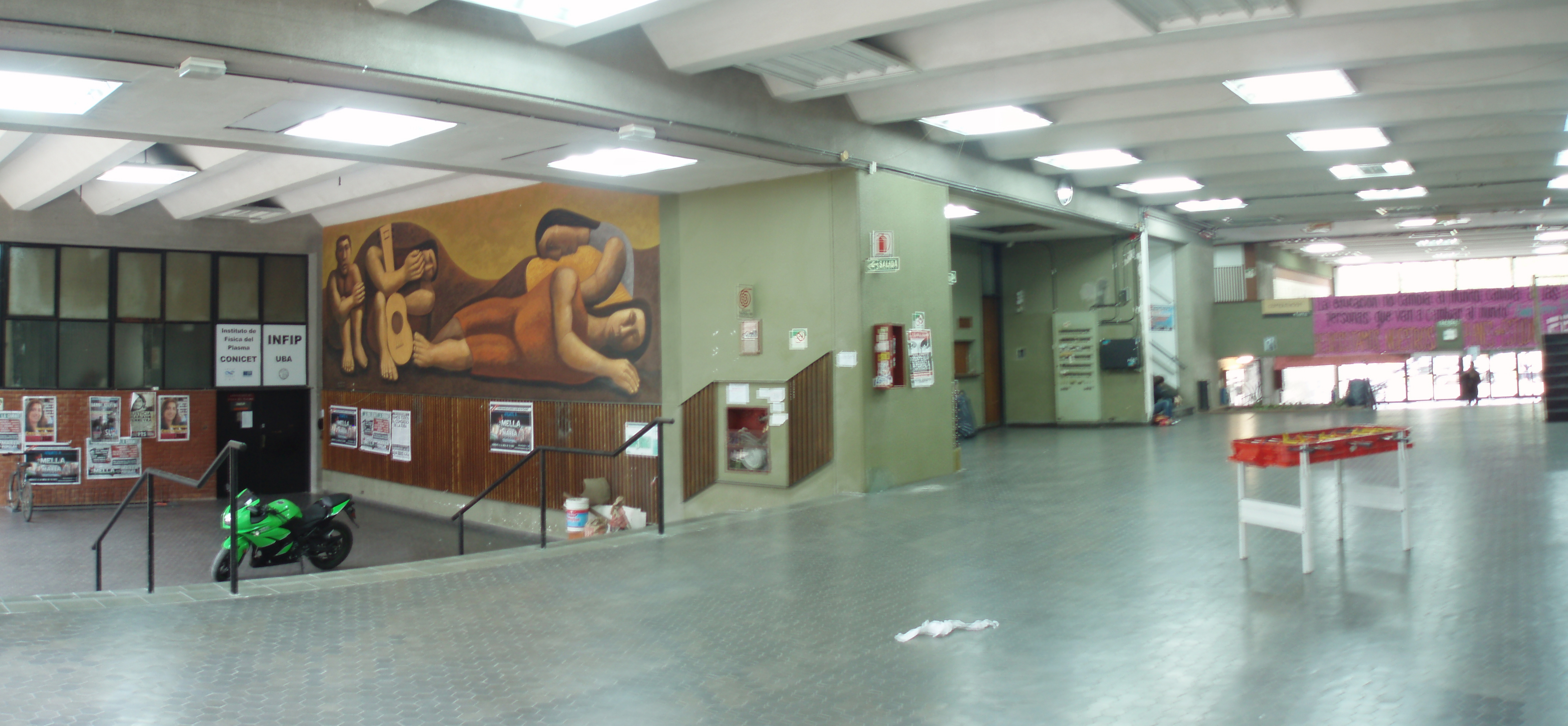 Hall del Pabellón 1 de la Fac. de Ciencias Exactas y Naturales de la UBA.